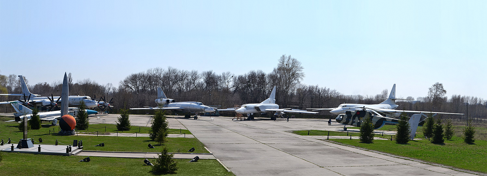 Панорамне фото експозиція літаків Дальньої авіації філії Національного військово-історичного музею України - Музею важкої бомбардувальної авіації